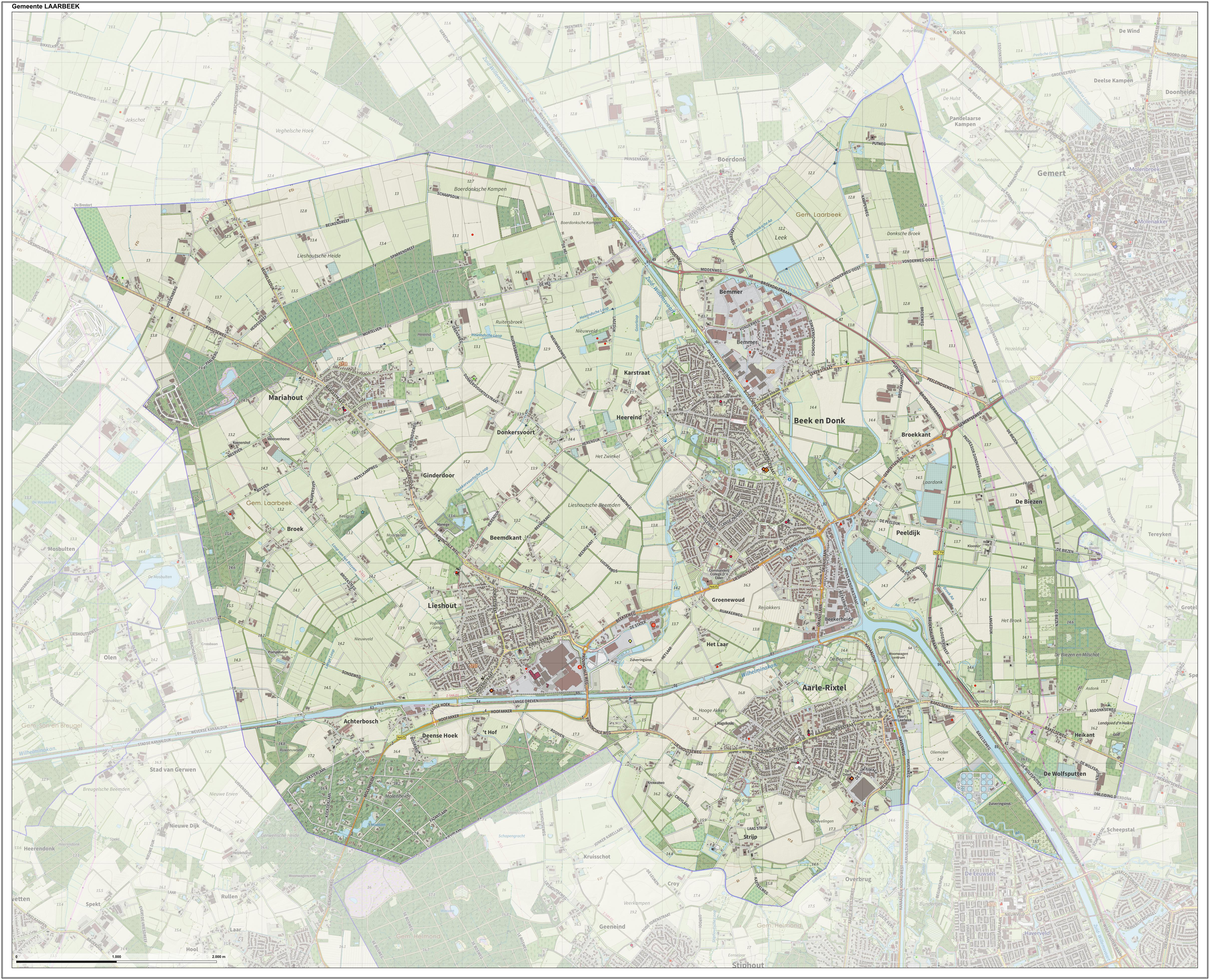 Topografische gemeentekaart. Resolutie: 400 pixels/km. Kaartbeeld samengesteld uit de open geodata van de Top10NL en Top25namen Basisregistratie Topografie, Kadaster, Creative Commons BY licentie. Gebouwvlakken uit open geodata BAG extract. Wegen uit de OpenStreetMap, OpenStreetMap community. Schaduwreliëf uit de Actuele Hoogtekaart AHN2. Samenstelling en kleurenschema: Jan-Willem van Aalst, met QGIS2. Zie ook de Legenda.